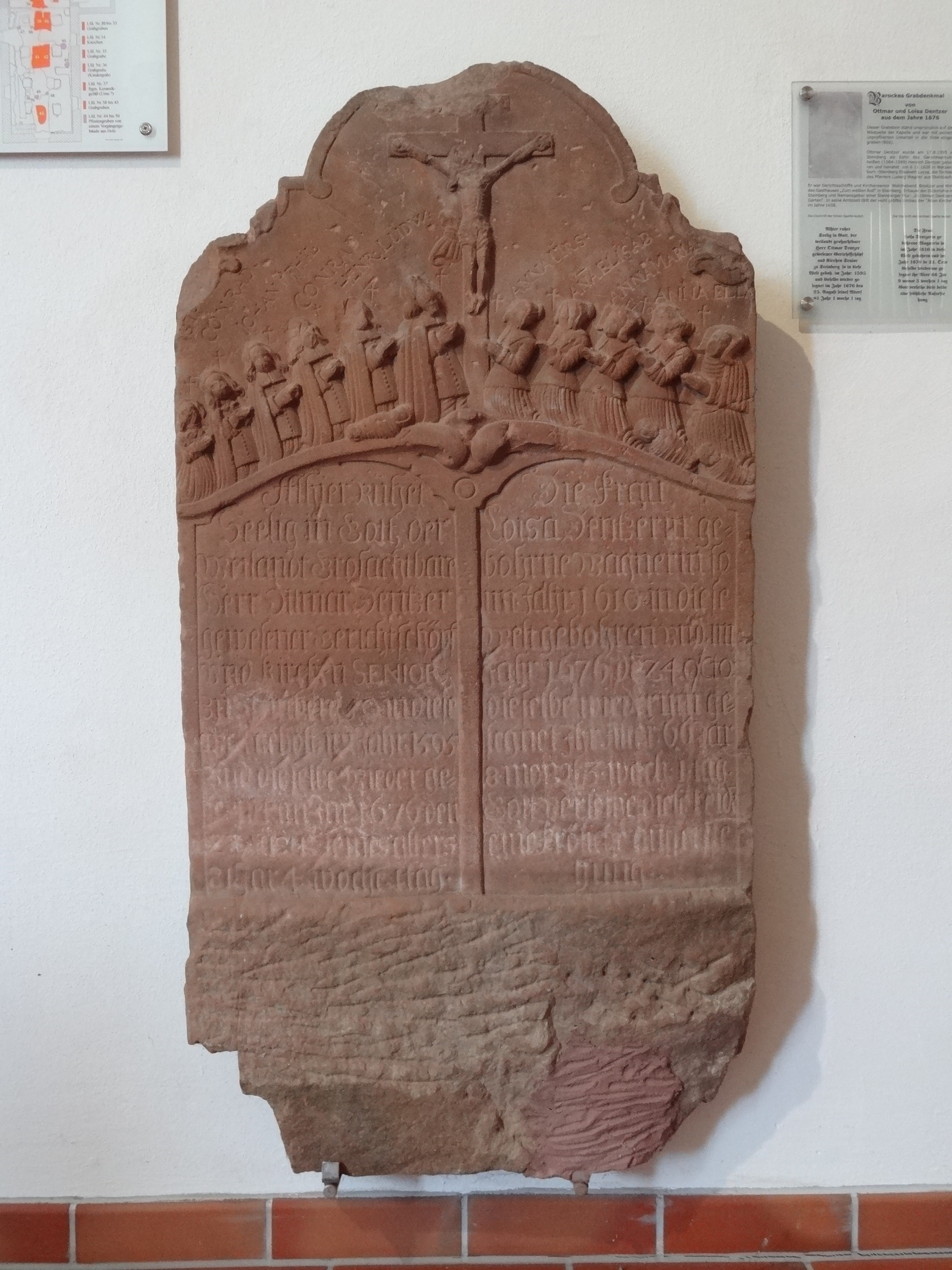 Alte Kirche (Watzenborn-Steinberg)